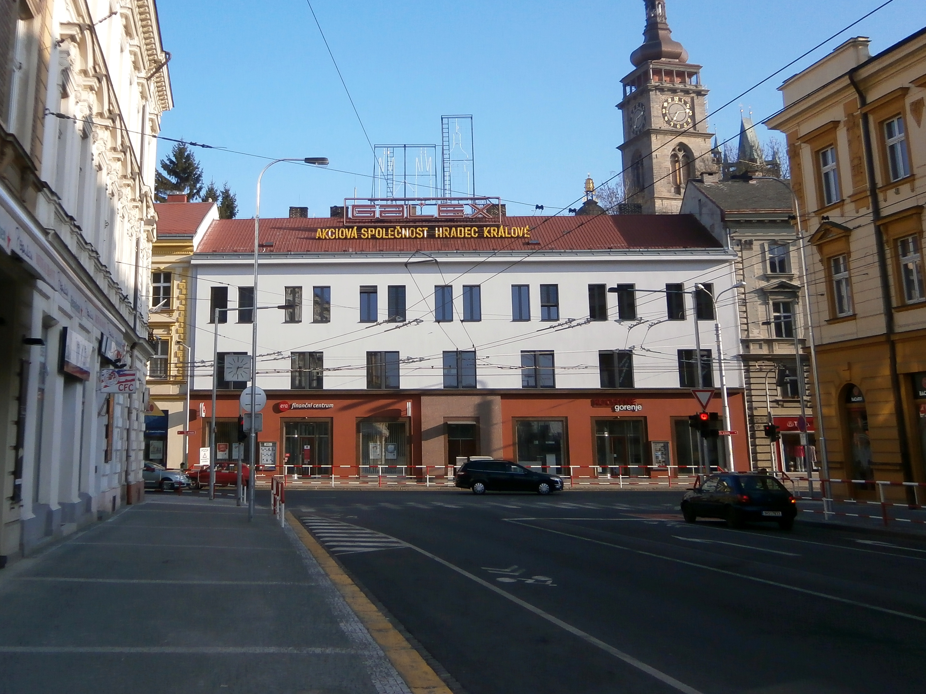 Roh ulic Mostecké a Čs. armády (Hradec Králové)